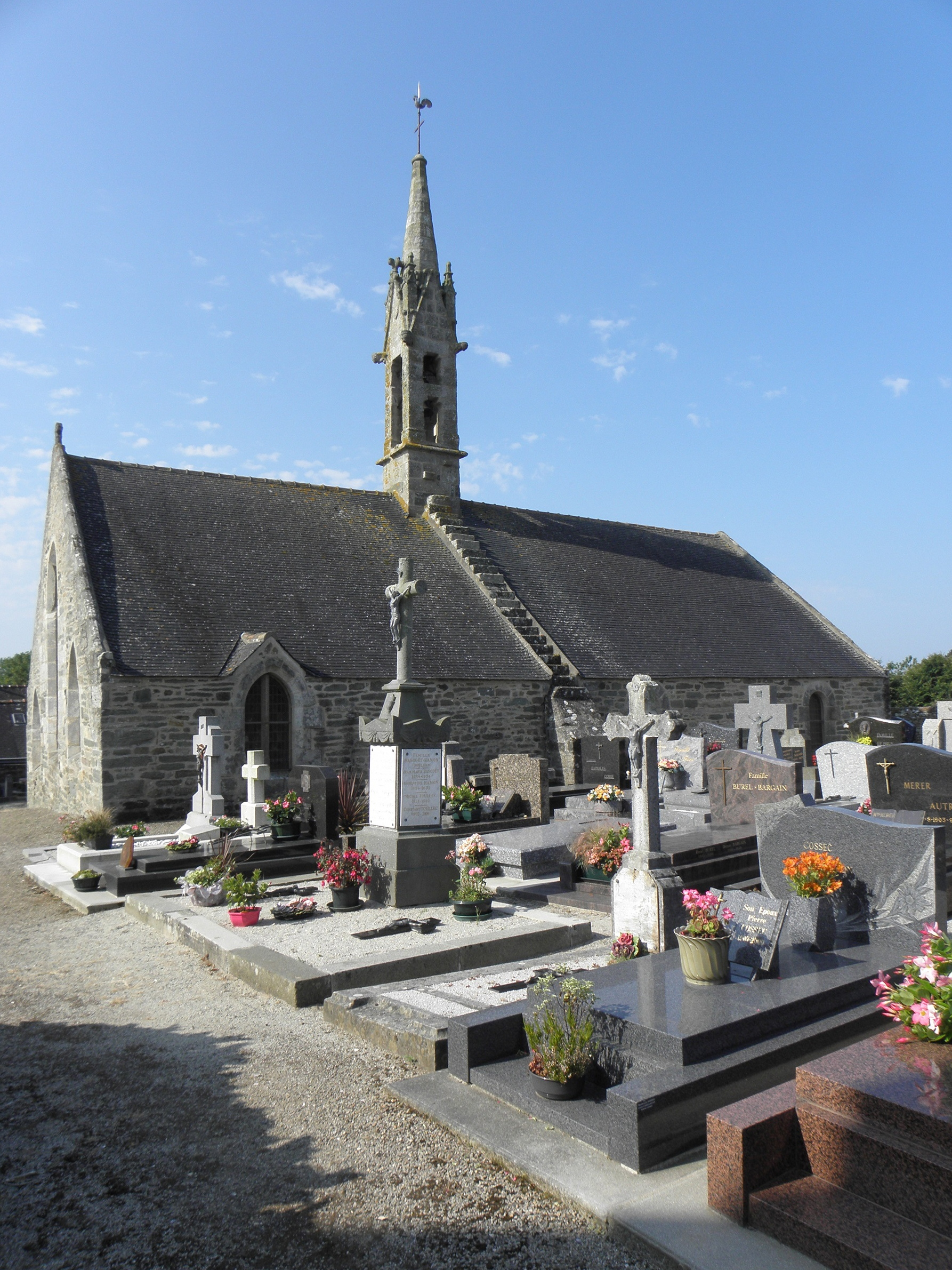 Église Saint-Boscat de Tréogat (29). Chevet et flanc septentrional.